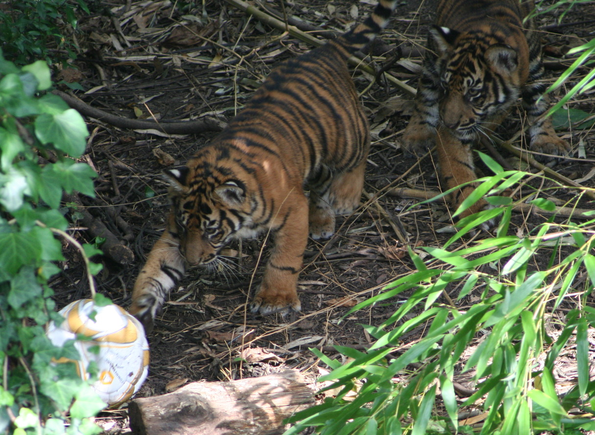 Tigerbabys Zoo Frankfurt